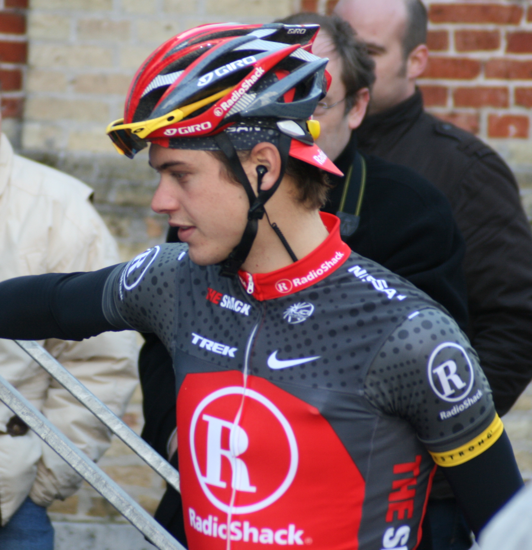 Bjorn Selander pendant les Trois jours de Flandre occidentale 2010